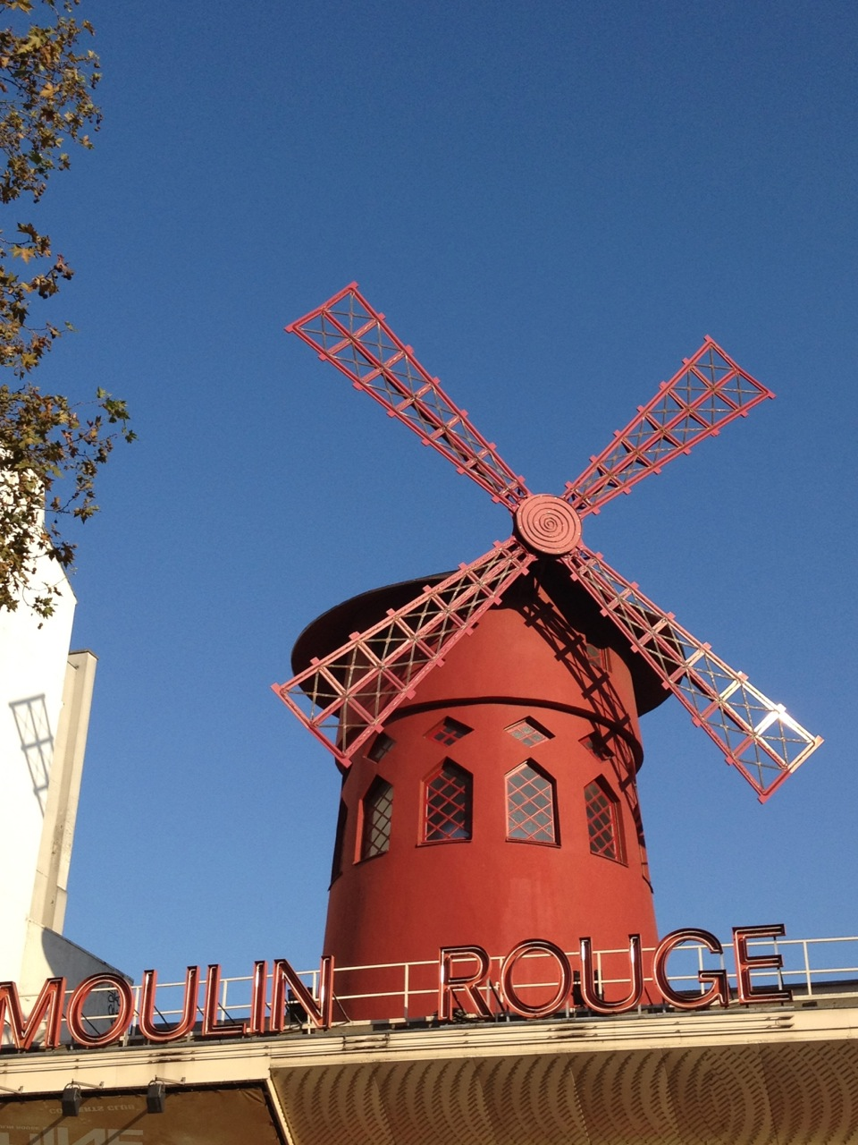 Projet Iphone4S vs Holga